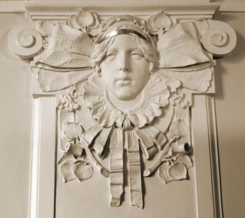 Maskaron v hlavní chodbě Měšťanské besedy v Plzni.